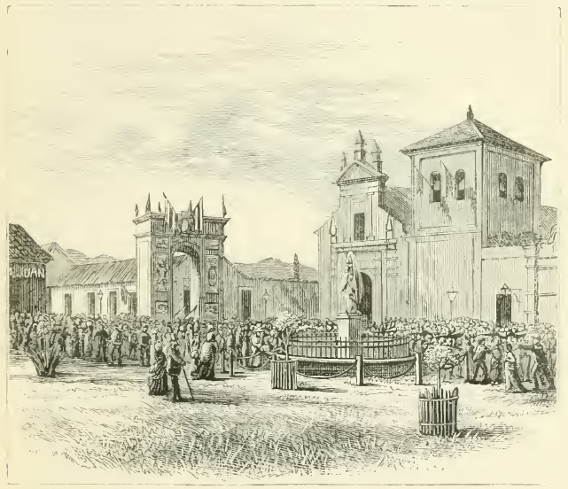 Arco de triunfo levantado en la Plaza de San Pablo (Caracas) para celebrar la victoria de Guzmán Blanco en la batalla de Apure. Febrero de 1872.